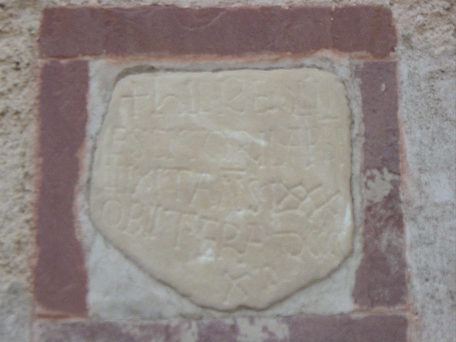 Làpida del prevere Orila de Sant Pere de Vilamajor, mort el 872 a l'edat de 80 anys